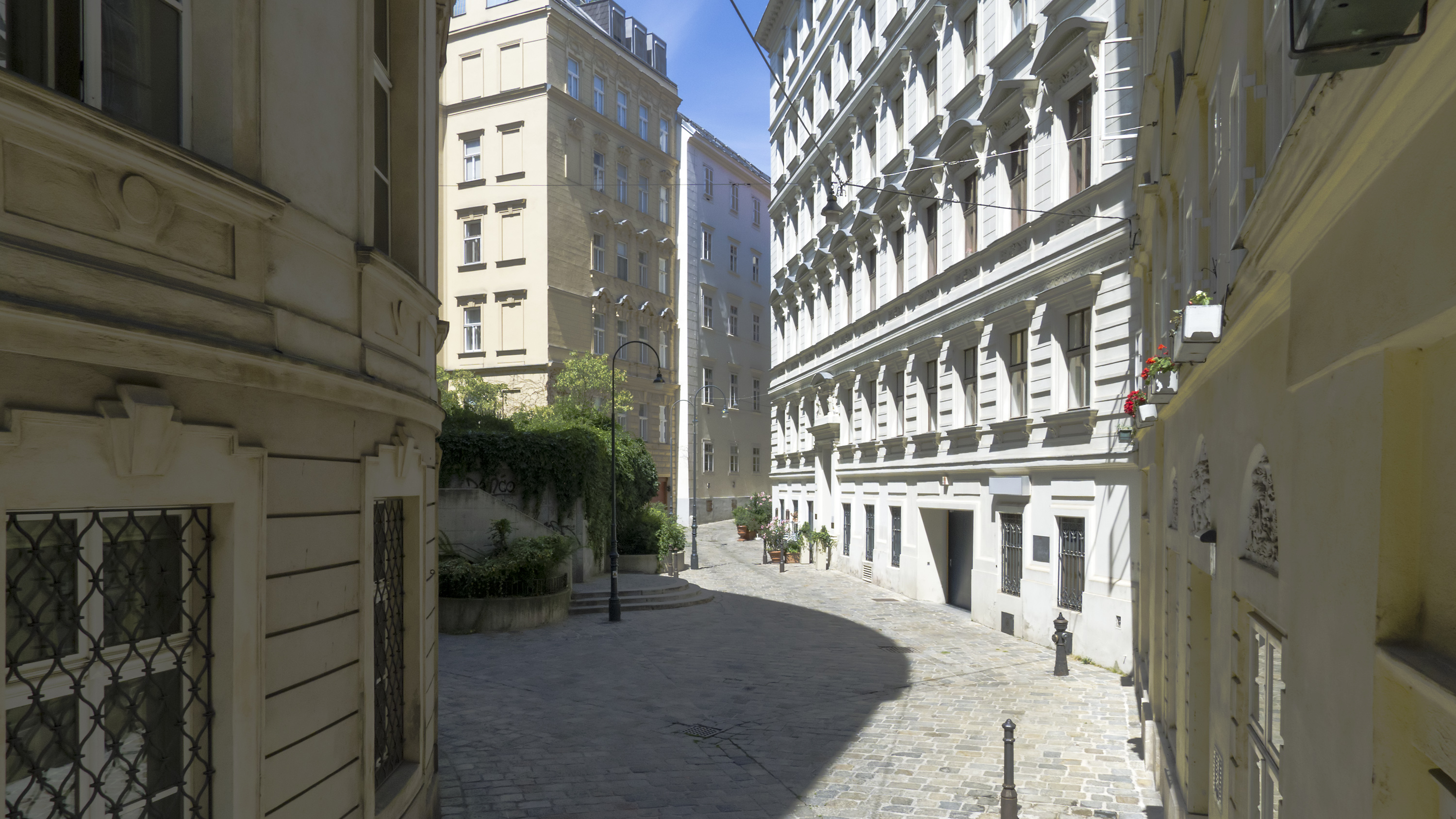 Kumpfgasse in Wien 1 bei Nr. 9 Richtung Norden